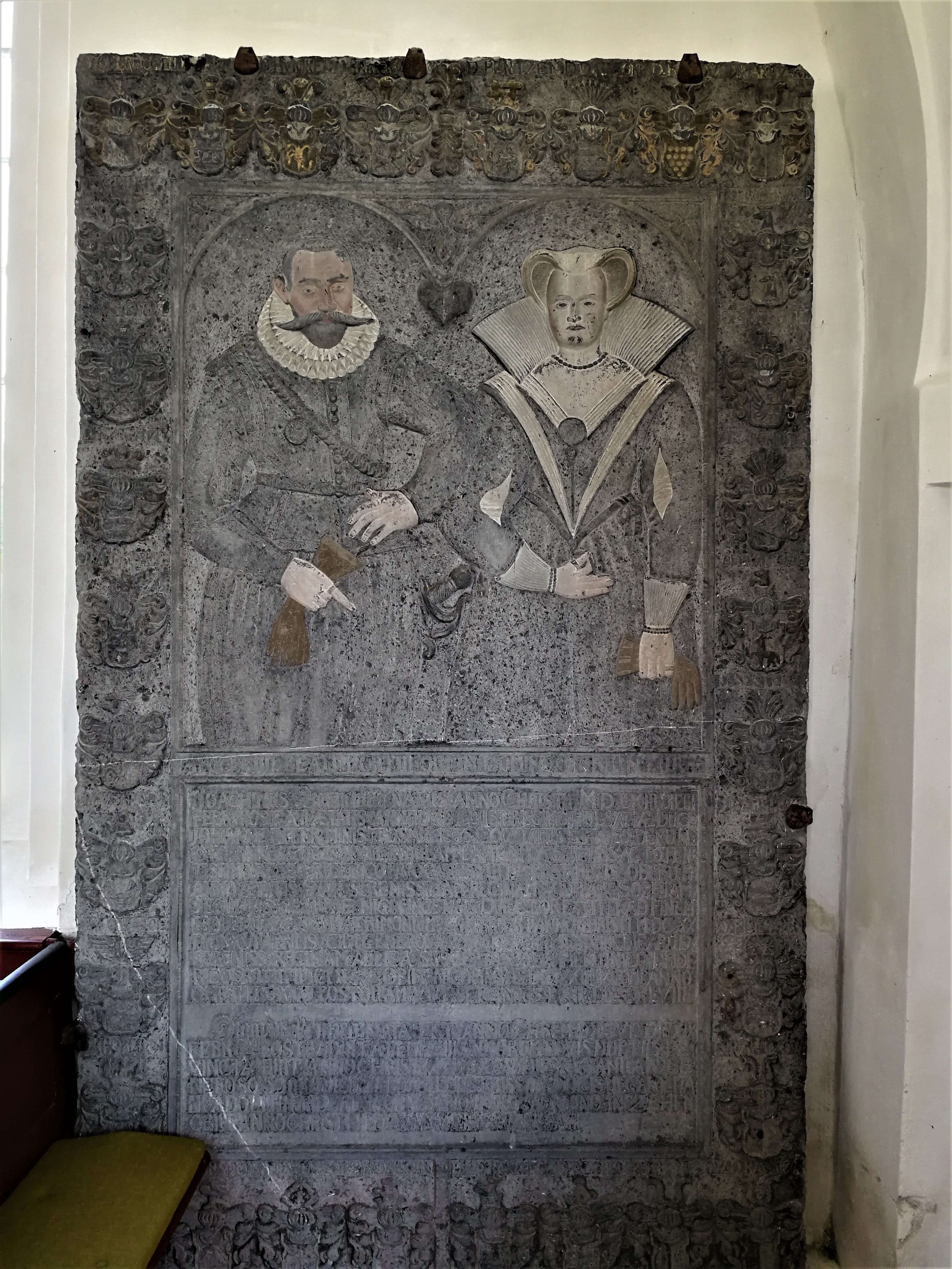 Epitafium over Joachim von Barnewitz og Øllegård Pentz 4983 Dannemare